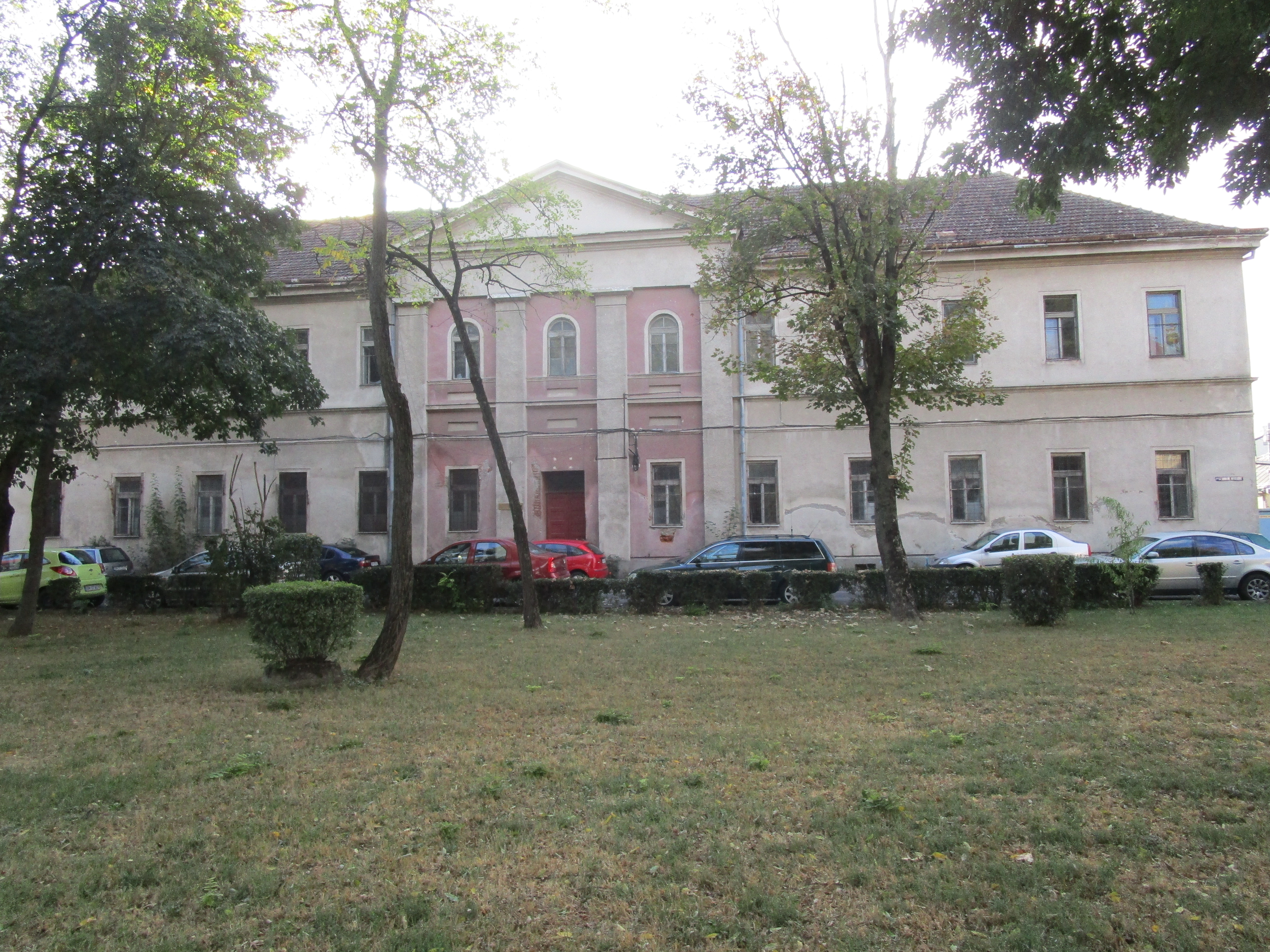 Spitalul călugărițelor misericordiene, azi secția psihiatrie a Spitalului Municipal